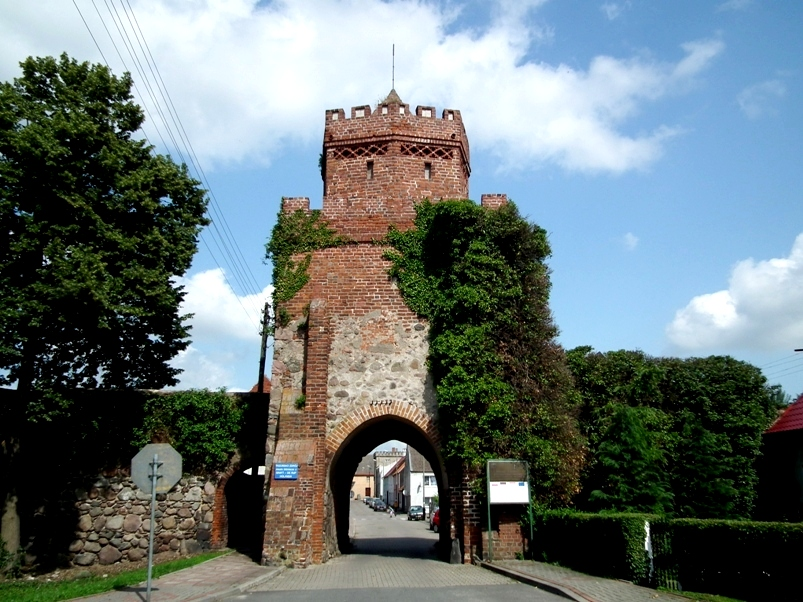 Brama Chojeńska w Trzcińsku Zdroju